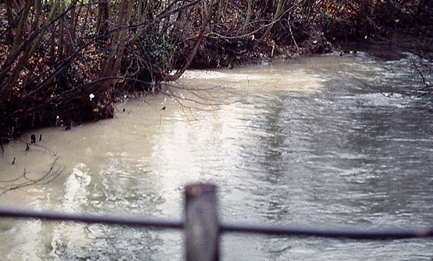 émissaire de rejet d'effluent (eau turbide, brune, tiède et riche en bactéries et en fibres) de la dernière des 4 papeteries de la vallée (à Blendecques, au centre de la commune, ici en décembre 1993). En 1993, c'est encore une des principales sources de pollution de l'Aa ; c'est à partir de ce point que pullulent les bactéries filamenteuses, jusqu'à St Omer au moins. La situation s'est fortement améliorée depuis concernant la qualité de l'eau, avec l'extension de la station d'épuration de l'usine et des changements de process. Il y a eu aussi des pollutions accidentelles, ou de lessivage suivant des pluies d'orage.